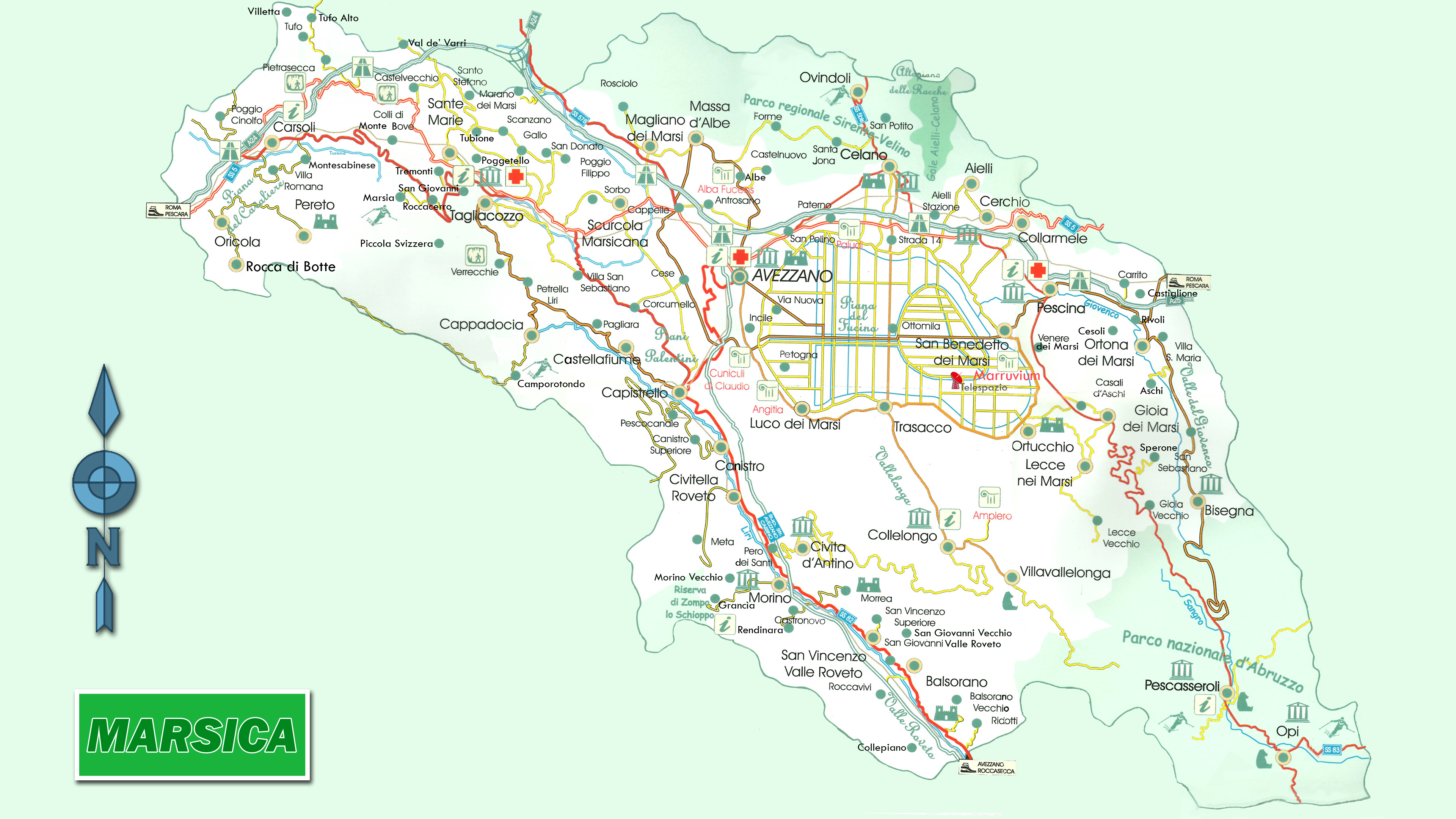 Mappa della Marsica